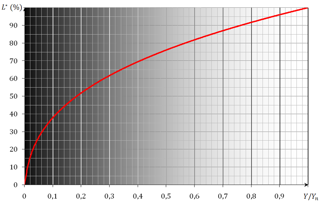 Clarté CIE luminosité 1976 Photométrie Colorimétrie CIELUV CIELAB